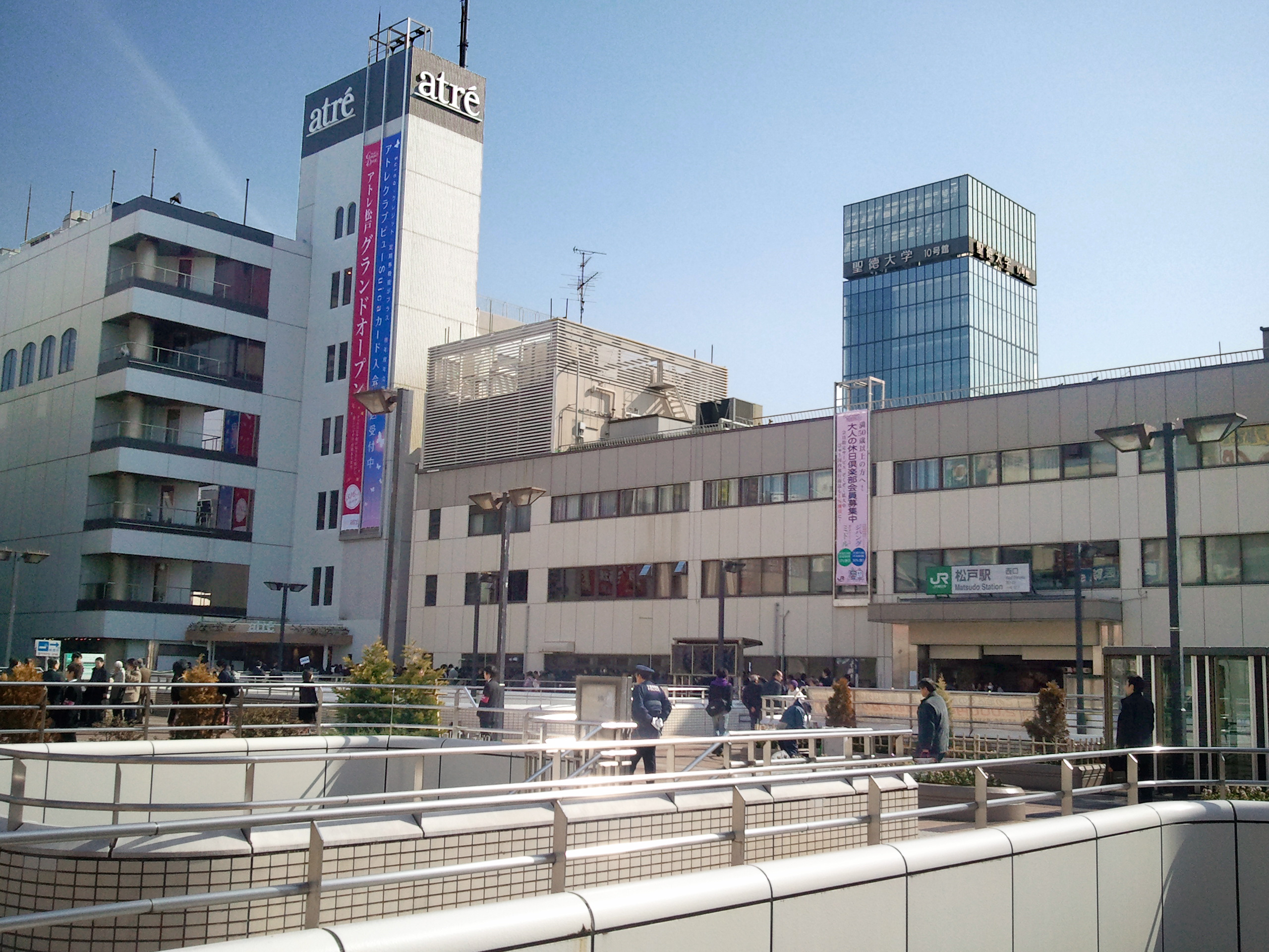 松戸駅西口(cropped)